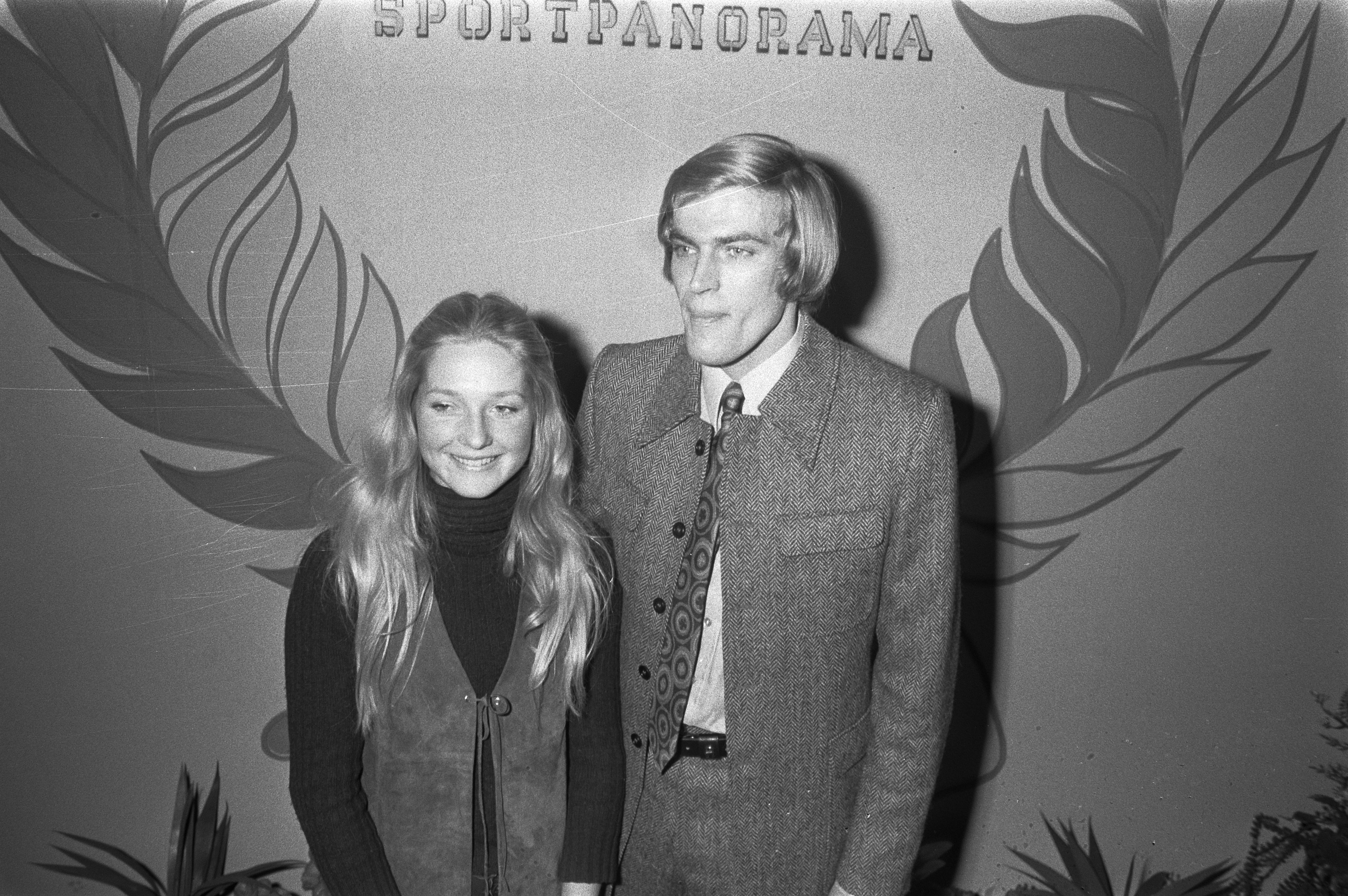 Sportman en sportvrouw van 1971 gekozen: Ard Schenk en Willy Stahle. AVRO's Sportpanorama, 29 december 1971